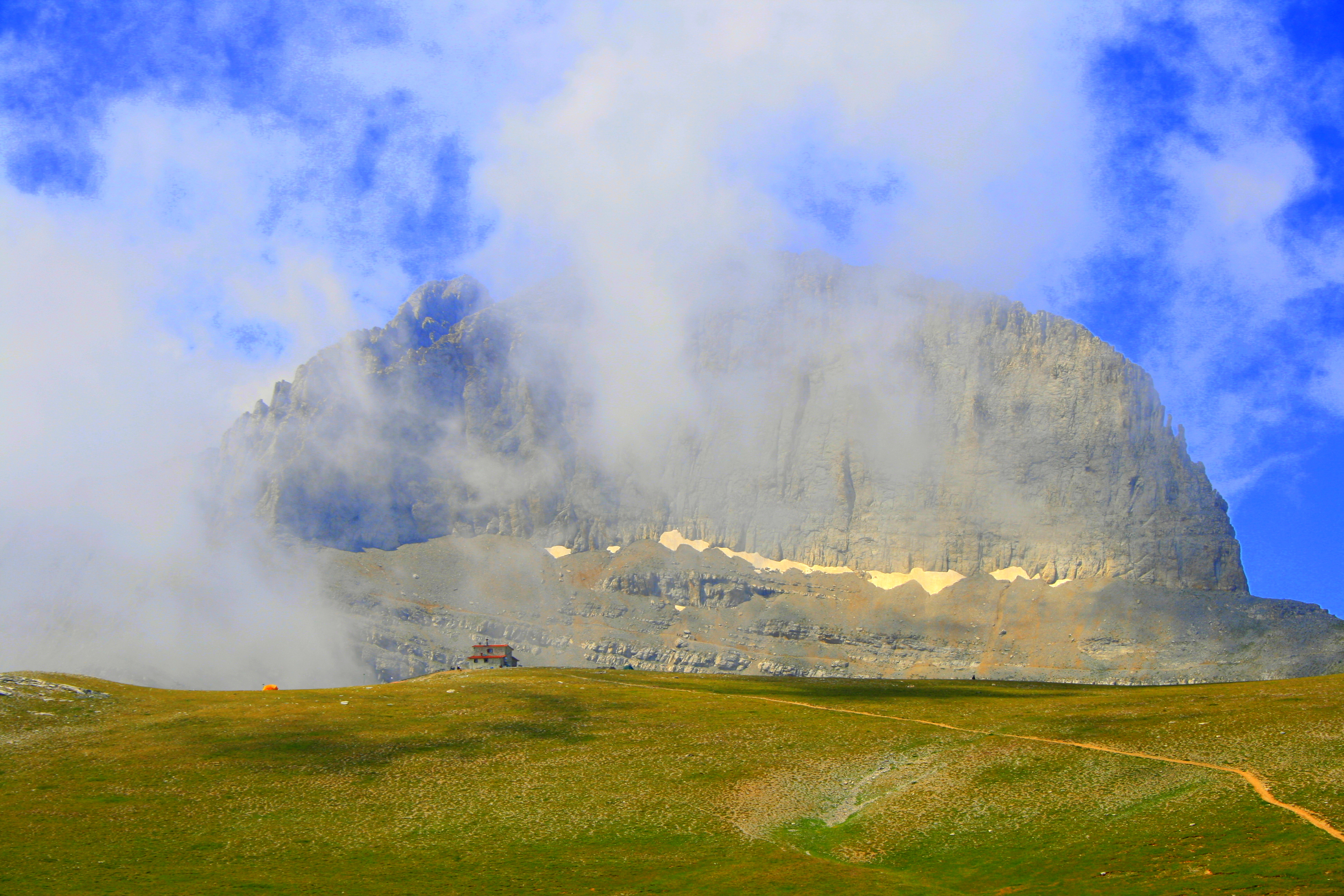 ΟΛΥΜΠΟΣ, 27 με 29/7/2015. Ο Μύτικας και το Στεφάνι από το οροπέδιο νυμφών στα 2.700μ.